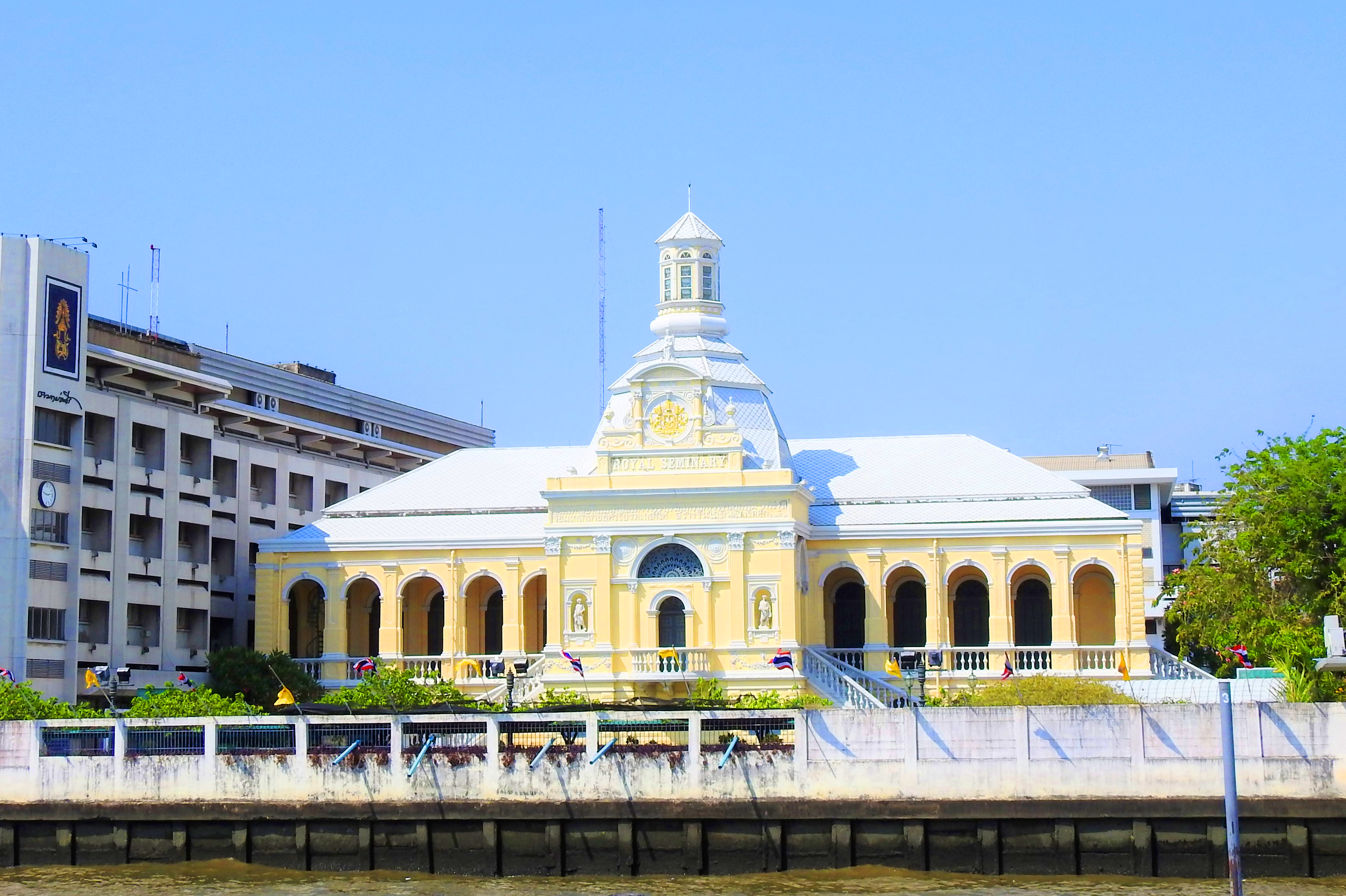 โรงเรียนราชินี